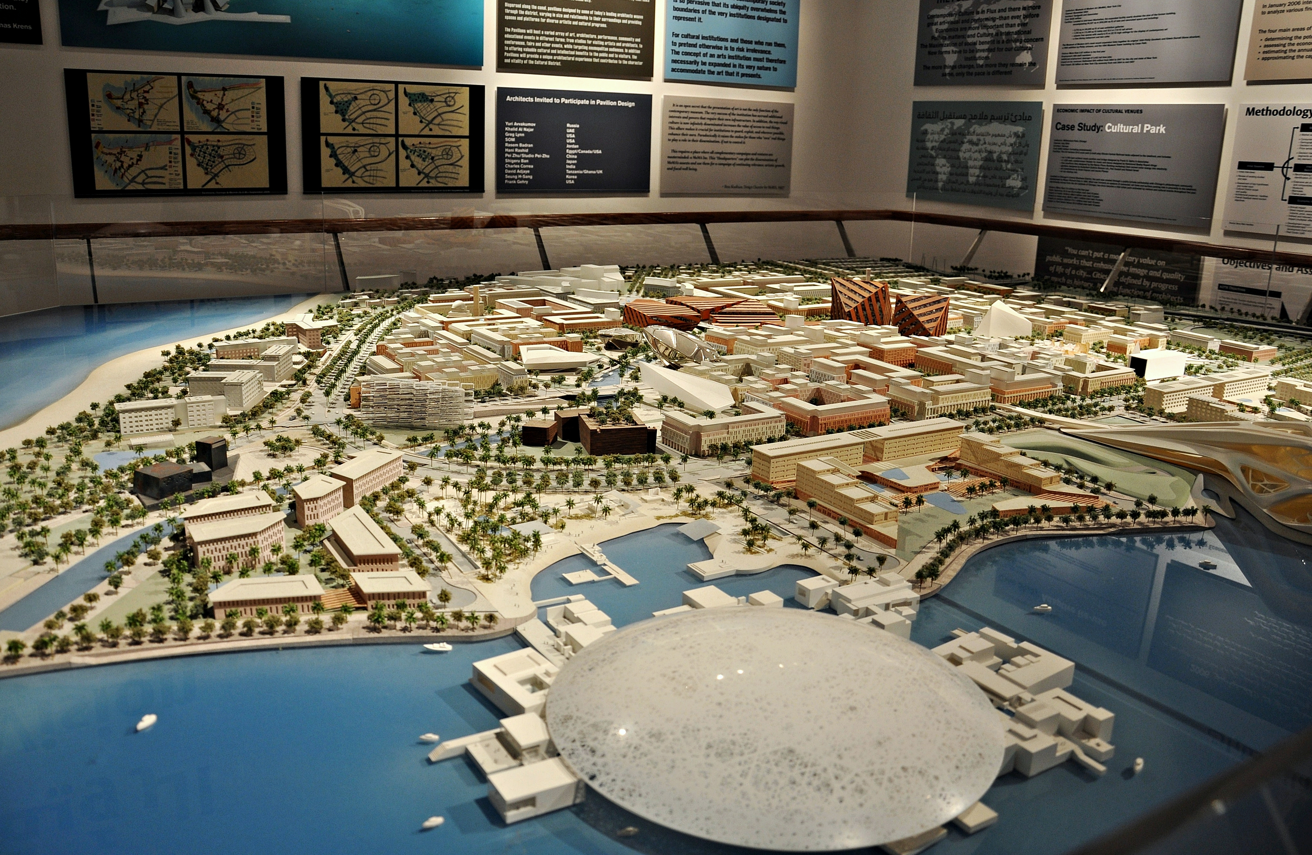 emiratos arabes